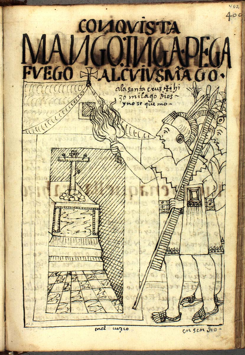 400 [402] MANGO INGA PEGA FVEGO AL CVIVS MANGO a la santa crus